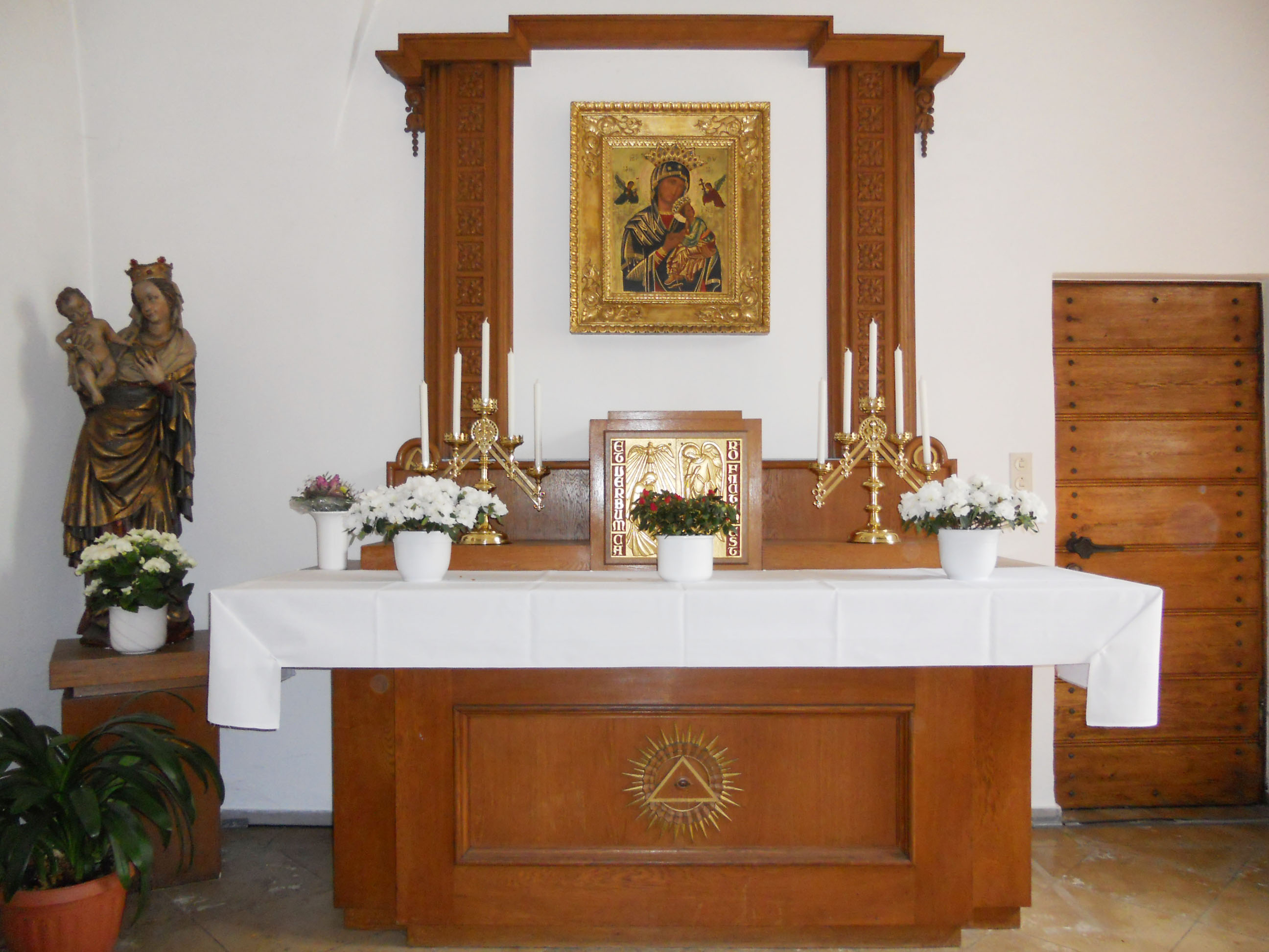 Andachtskapelle in der Propsteikirche in Brilon